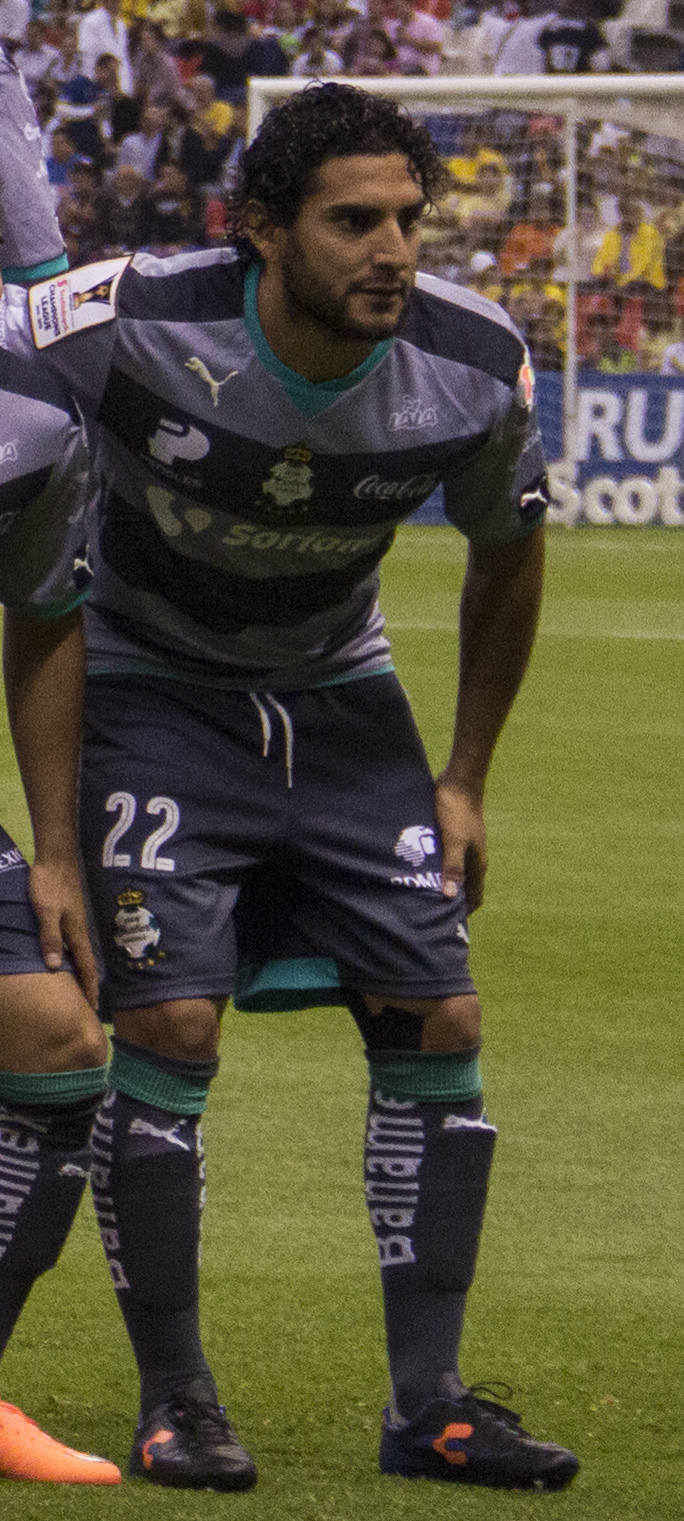 América vs Santos